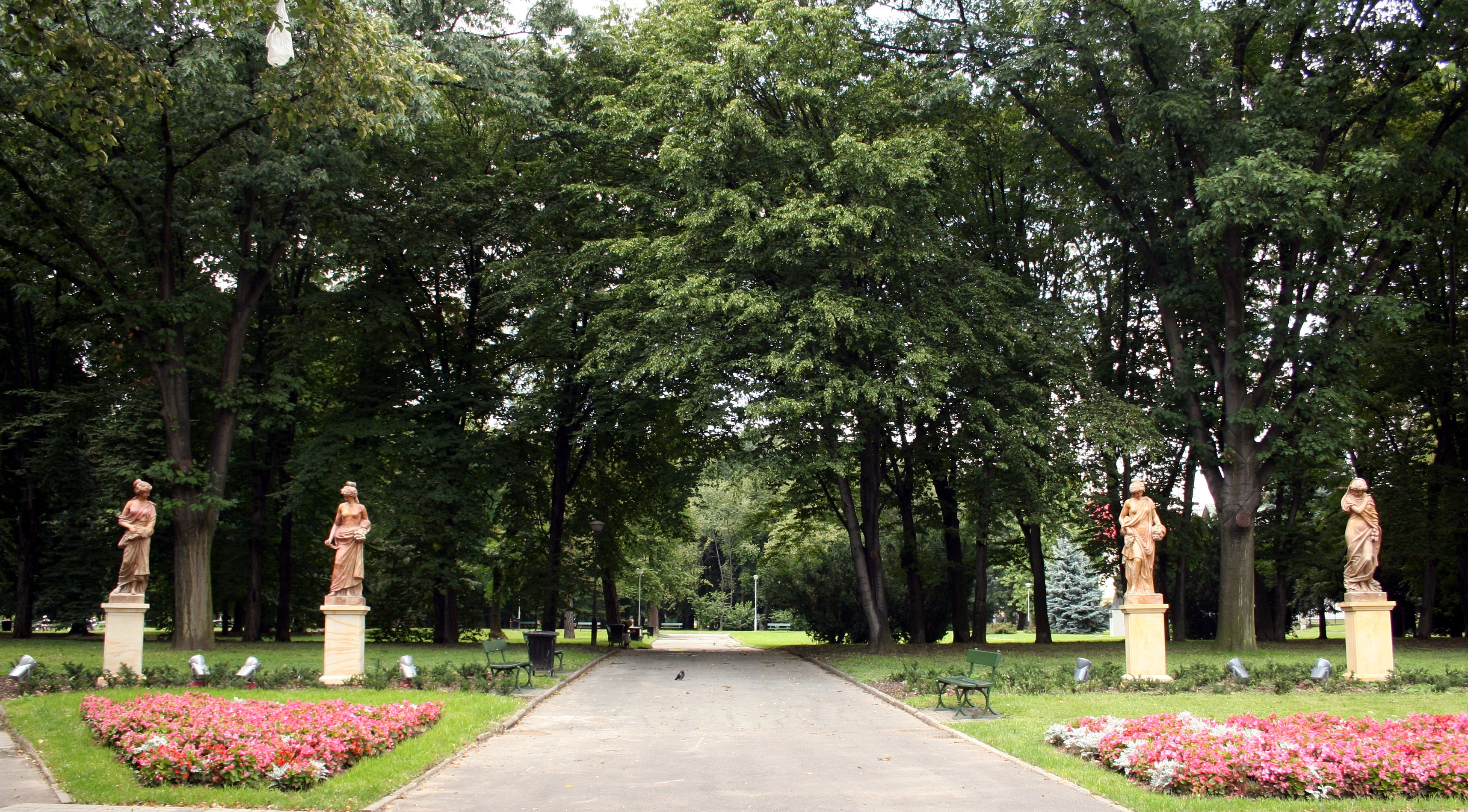 Ogród Miejski im. Solidarności w Rzeszowie